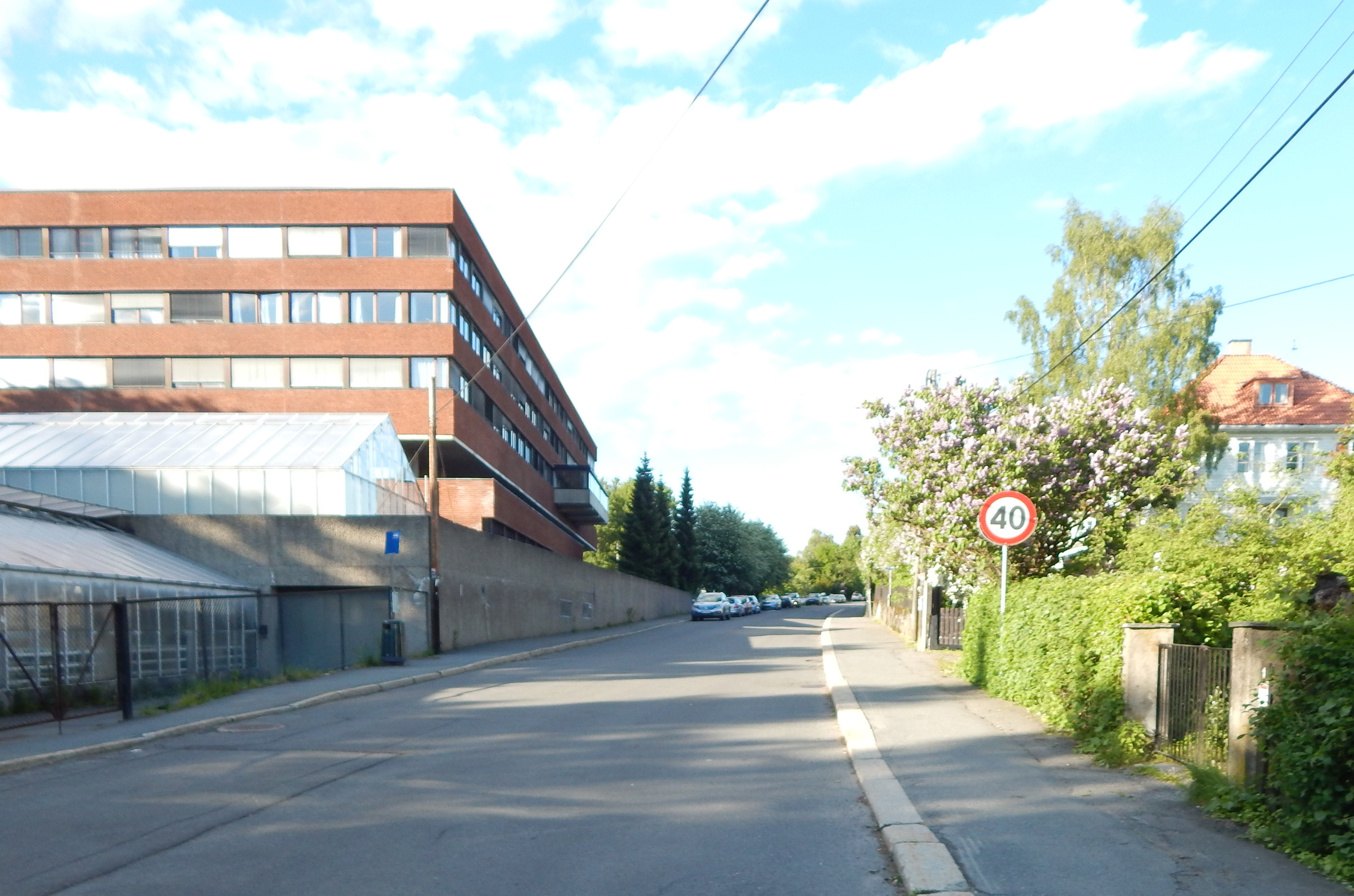 Prestegårdsveien på Blindern